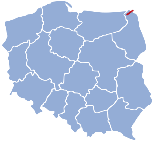 Przebieg linii kolejowej numer 51